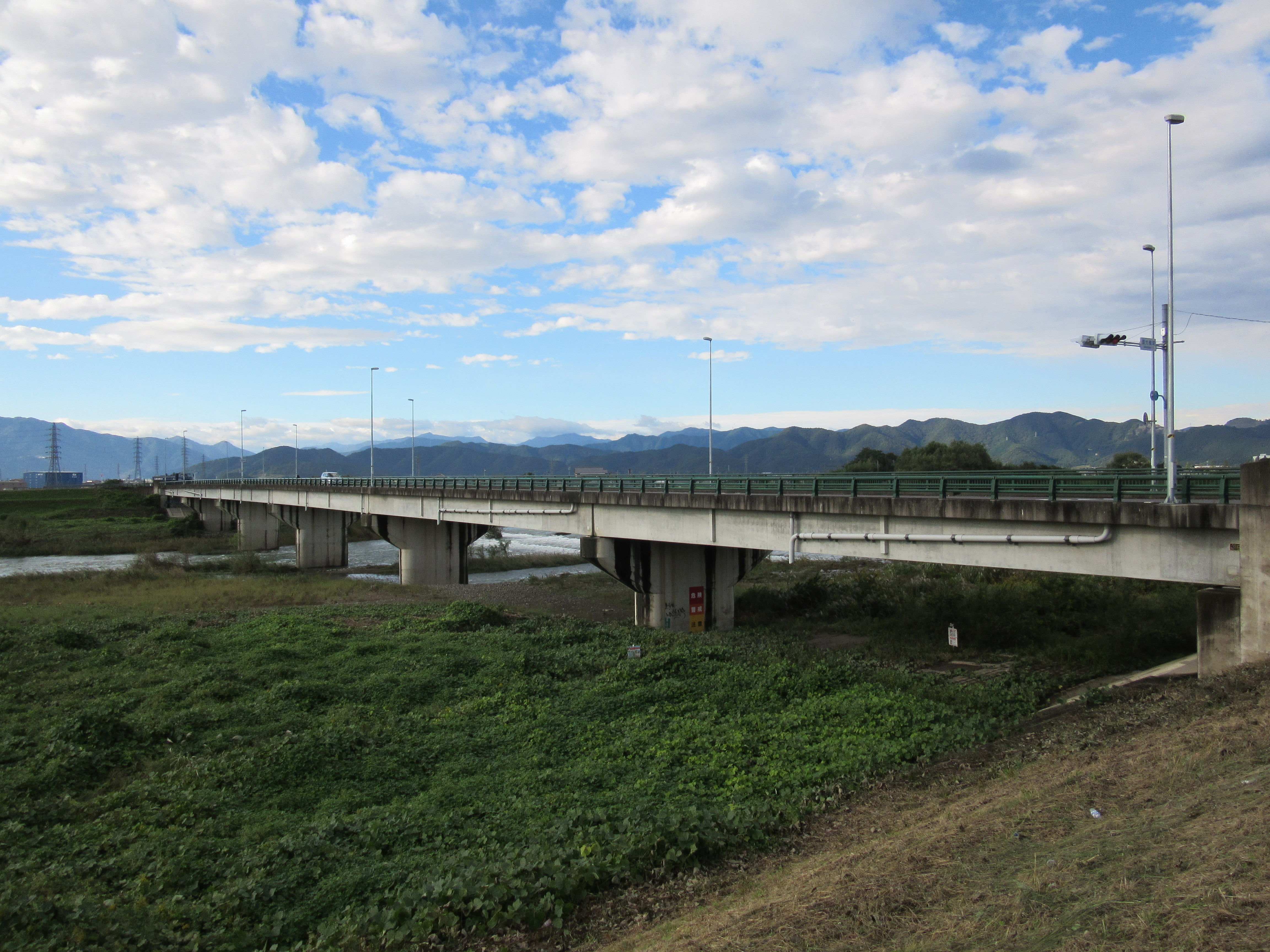 真大橋（根尾川）